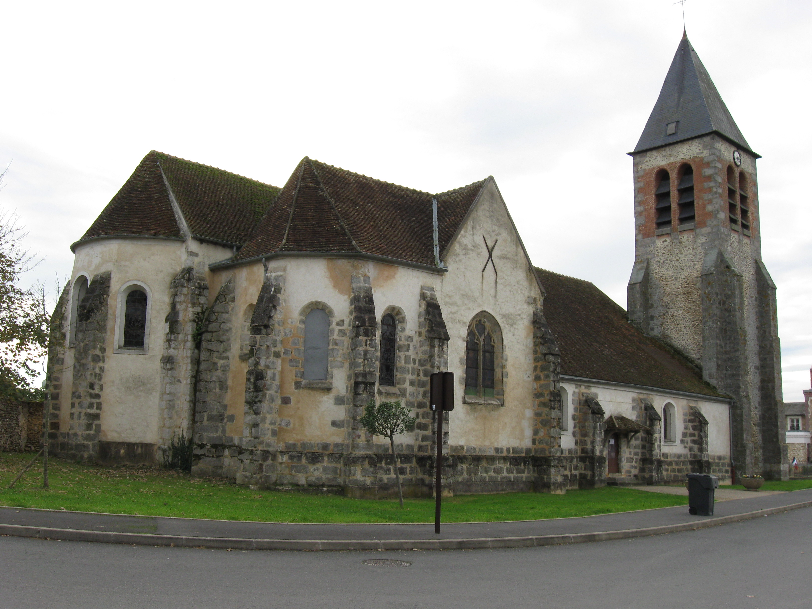 Église Saint-Martin de Pommeuse (département de la Seine-et-Marne, région Île-de-France).